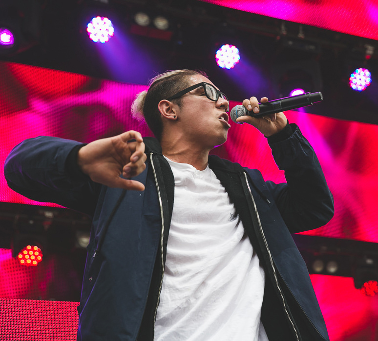 William Singe